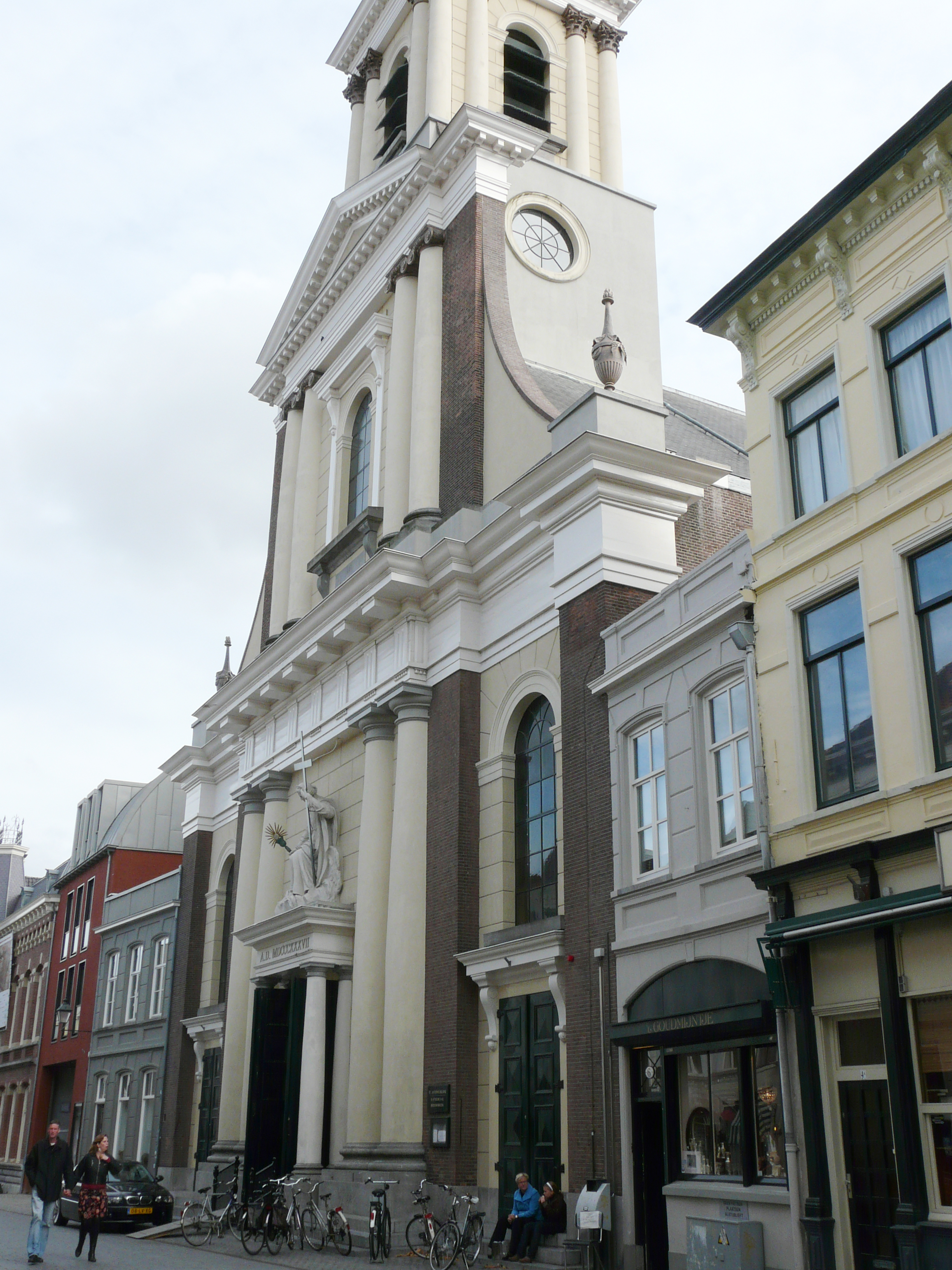 Sint-Antoniuskathedraal in Breda Centrum in Breda